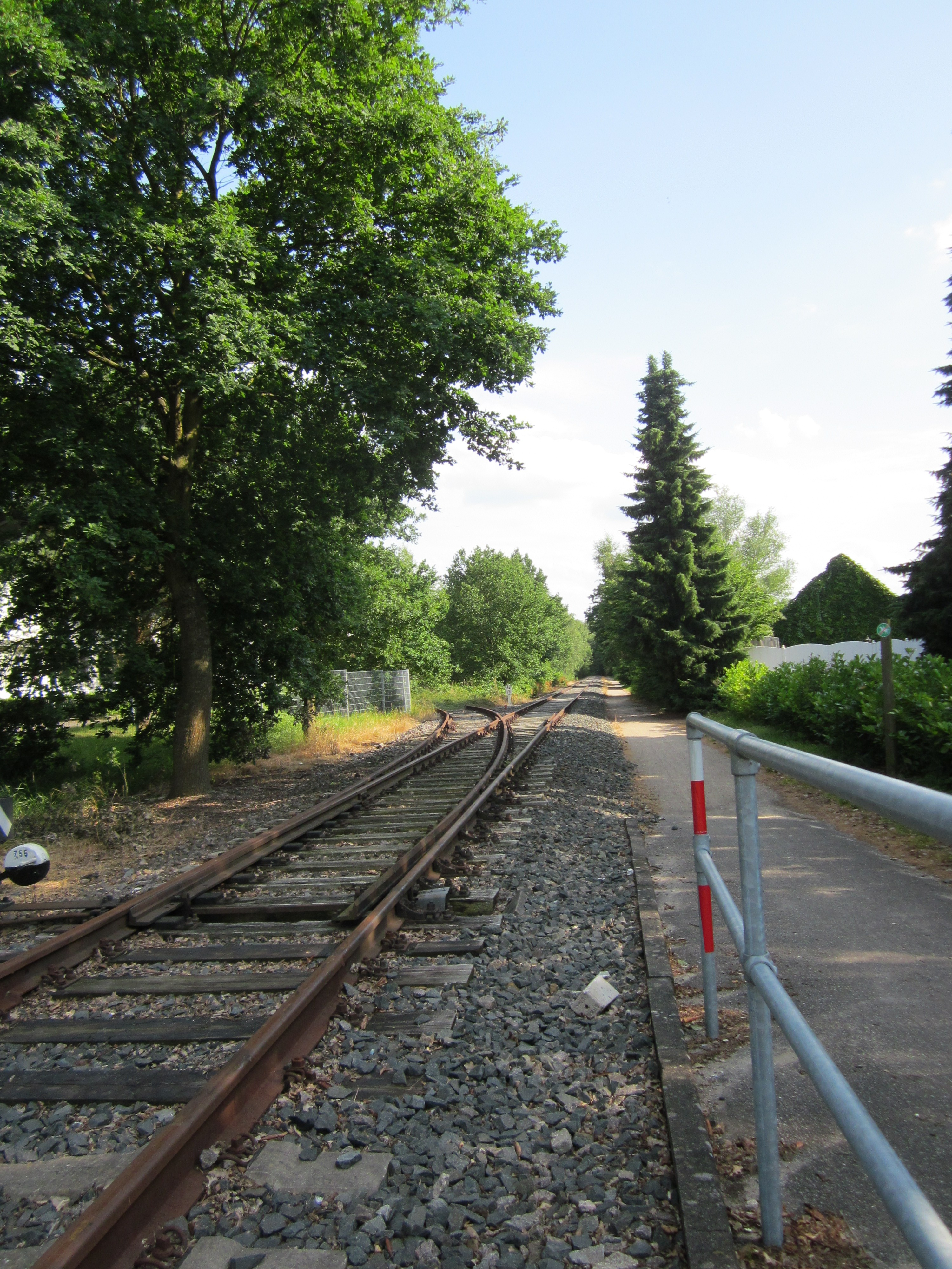 Blick auf das südliche Ende des Stammgleises Harkshörn der Norderstedter Industriebahn in Norderstedt. Die Bahn endet in der Bildmitte kurz vor dem Norderstedter Stadtpark. Der nach Westen (links) abgehende Gleisanschluss bei Kilometer 4,0 diente ursprünglich zur Belieferung des Norderstedter Lagers der Hertie Waren- und Kaufhaus GmbH.